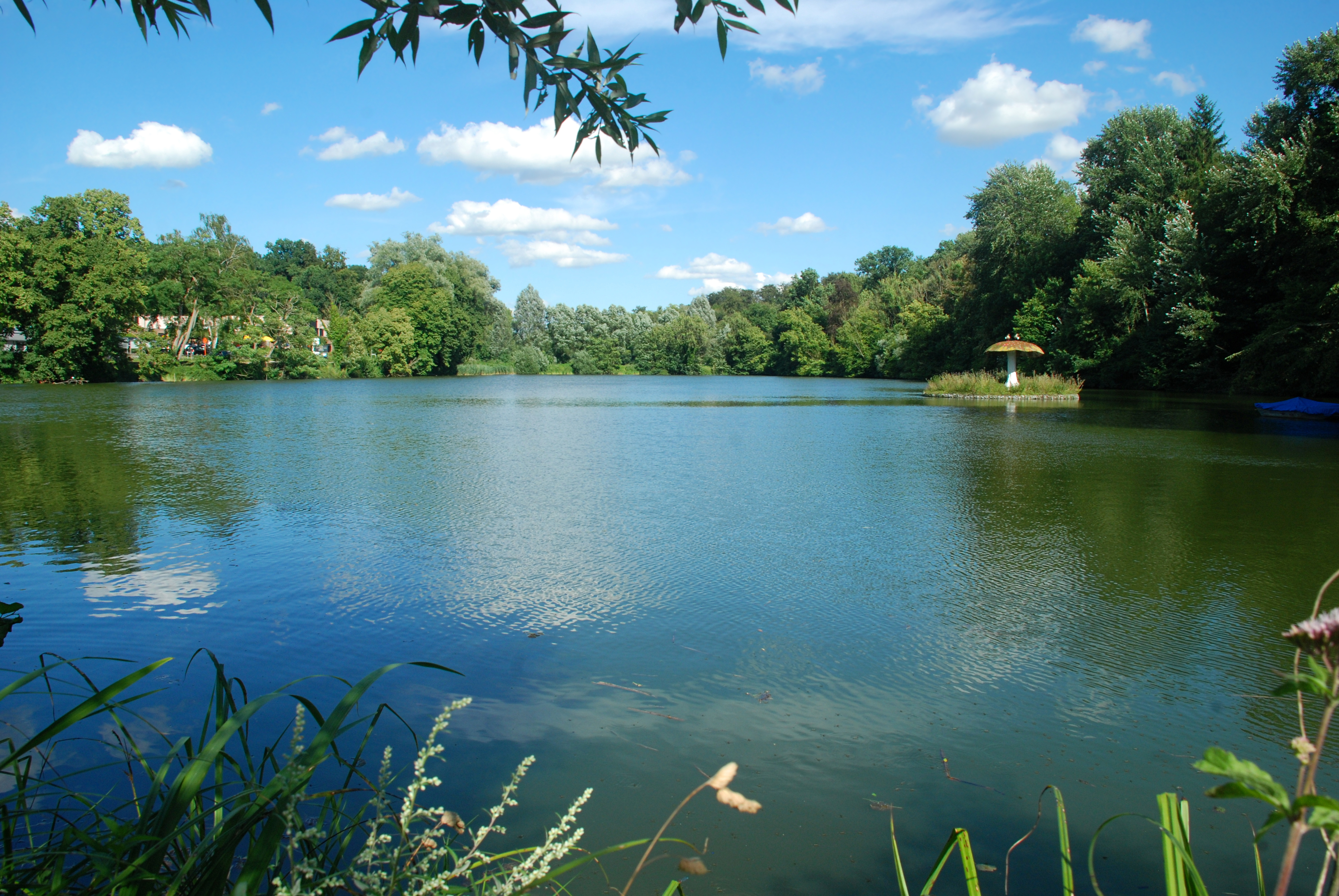 Belgique - Brabant flamand - Oud-Heverlee - Spaans Dak - étang Huisvijver